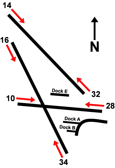 Pistensystem am Flughafen Zürich in der Schweiz / Zurich International Airport